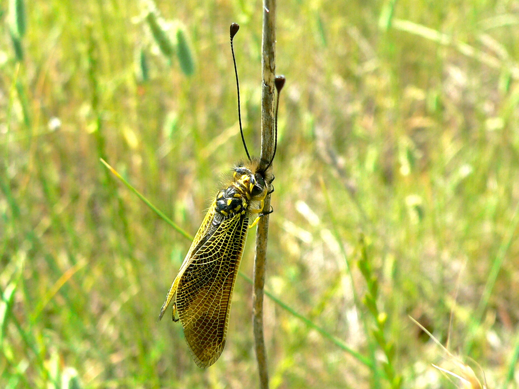 Octon, Hérault, FRANCE